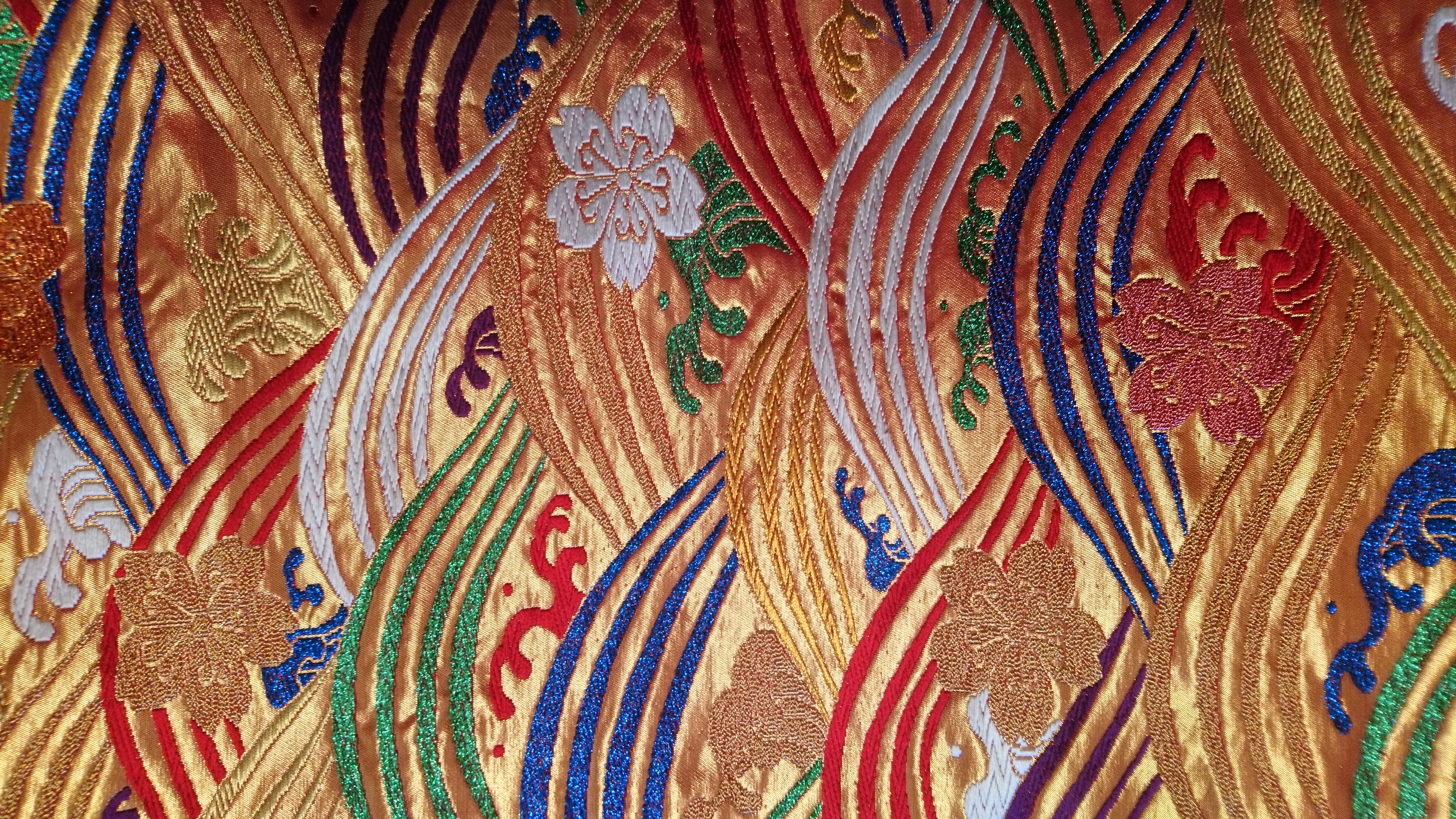 昭和40~50年代に丹後地方で製織された西陣帯の織物。